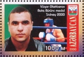 Vüqar Ələkbərov